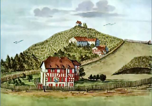 Kloster Selnau, Selnaustrasse, im Vordergrund das 1767 abgebrannte und dann abgebrochene letzte Gebäude des Klosters Selnau. Aquarell um 1650. Zentralbibliothek Sammlung Steinfels.